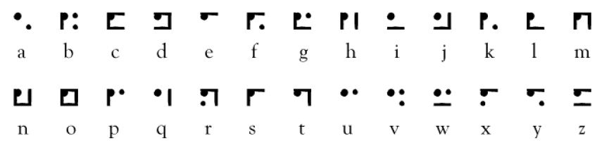 Square Alphabet aus dem Jahre 1815